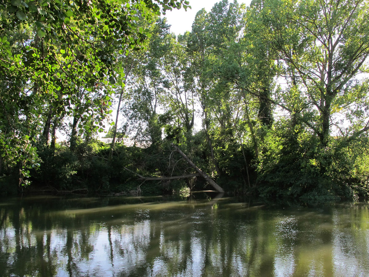 Desembocadura del río Oroncillo en el Ebro a la altura de la localdad de Miranda de Ebro.